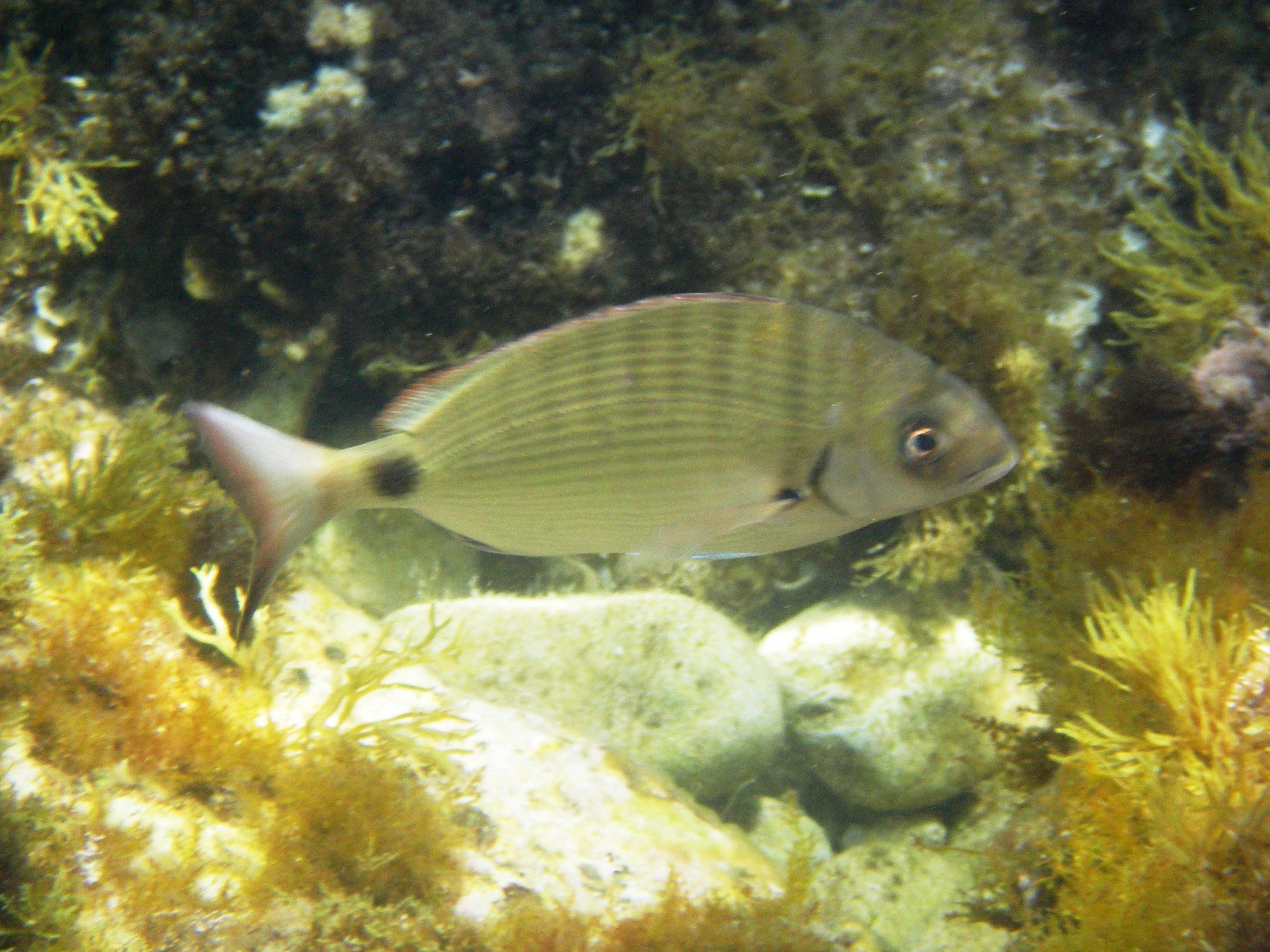 Diplodus sargus Mediterranean Sea